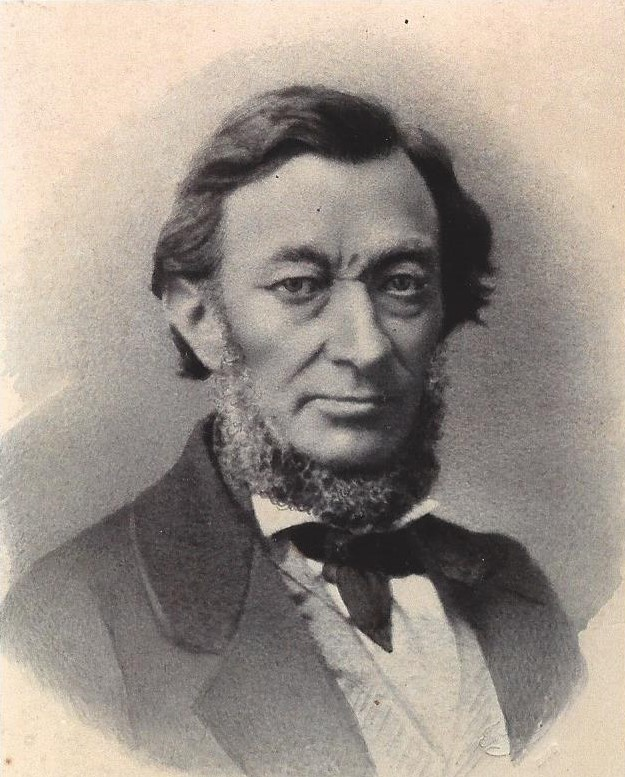 Porträtfotografie von Theodor Olshausen